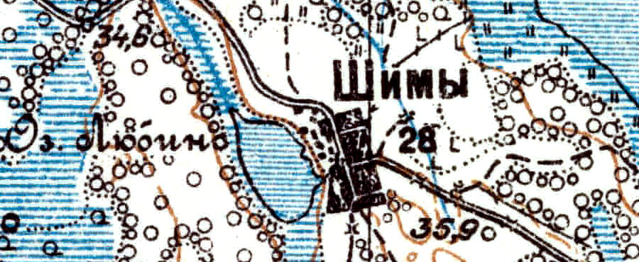 Топографическая карта Ленинградской области, квадрат VIc-26 (Ставотино), деревня Шима